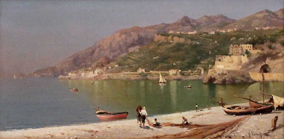 Scordio di costa, olio su tavola, 10 x 19 cm, coll. privata